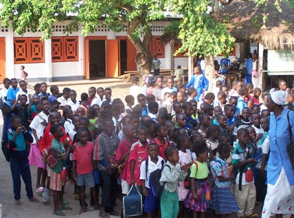 Rassemblement cour Ecole Spéciale Brazzaville